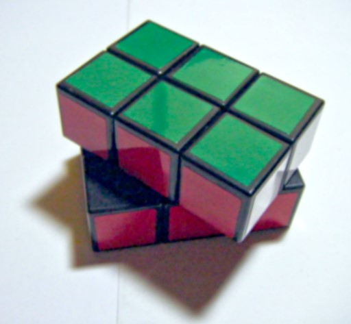 轉動中的2x2x3魔術方塊